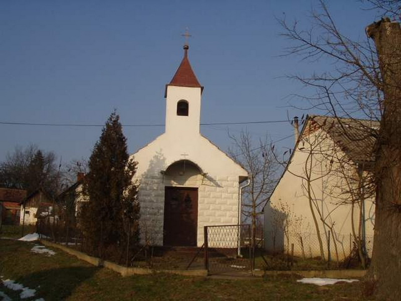 Ladinec - Chapel frontal view